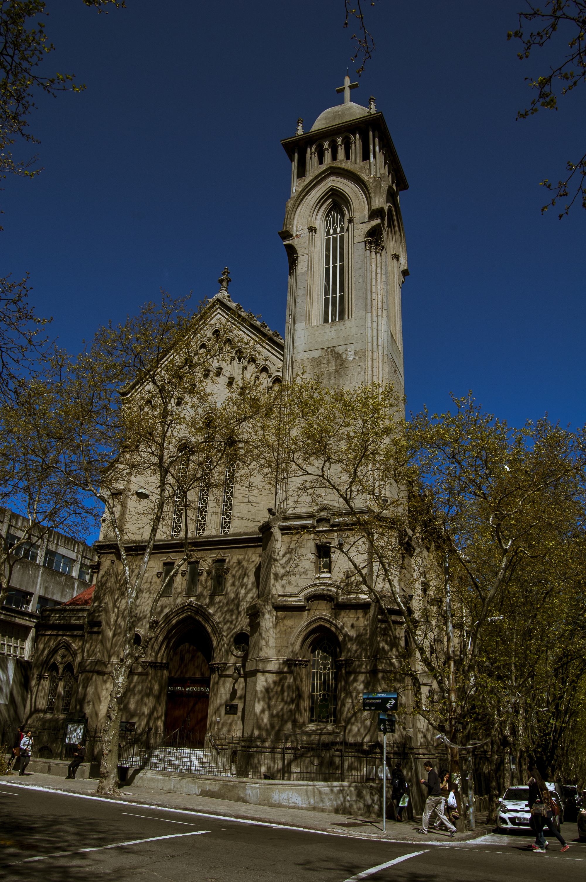 Templo de la Iglesia Metodista. Ubicada en el departamento de Montevideo